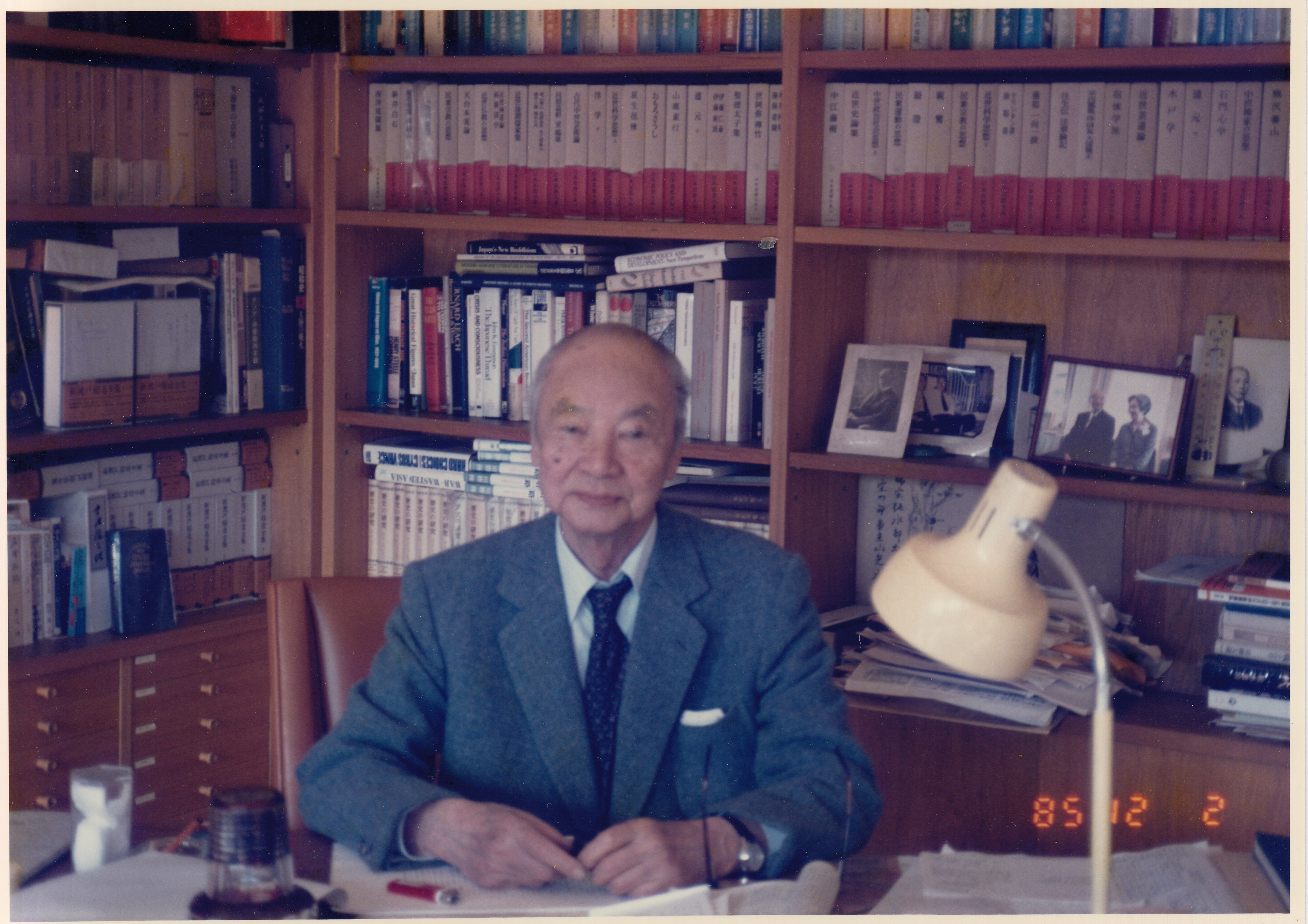 Shigeharu MATSUMOTO